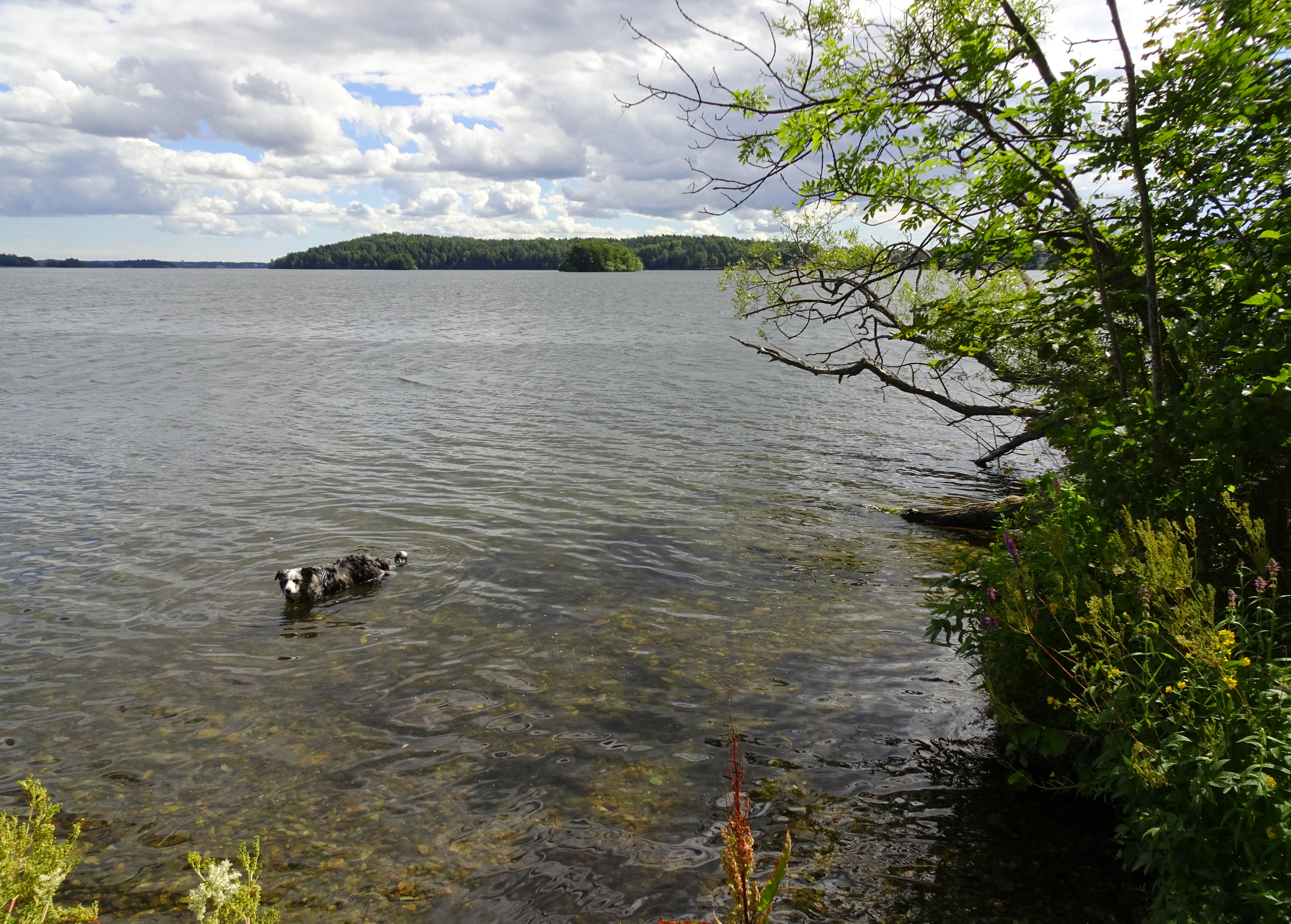 Huvududdens naturreservat, yttersta spetsen vid Långtarmen